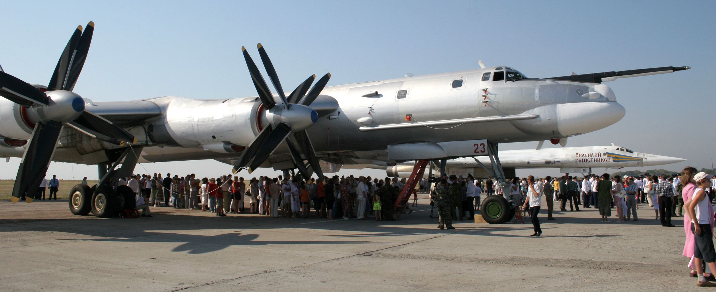 Самолёт Ту-95 бортовой номер 23